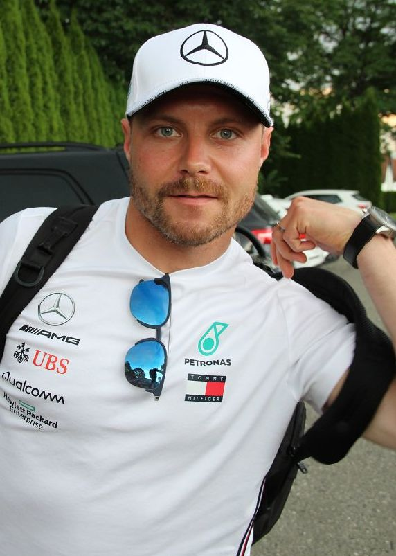 Formula 1 2019 / Schloss Gabelhofen